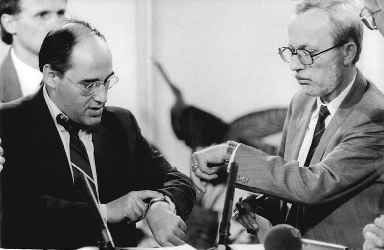 ADN / Settnik / 7.5.90 / Berlin: In wenigen Minuten beginnt das Wahlstudio im Palast der Republik, zu dem im Anschluß an die Kommunalwahlen in der DDR am 6.5. - neben den Vorsitzenden der PDS, Gregor Gysi (l), und der CDU Lothar de Maiziere (r) - alle Parteivorsitzenden geladen worden waren. Abgebildete Personen: Gysi, Gregor Dr.: SED, Vorsitzender der PDS, Rechtsanwalt, Bundesrepublik Deutschland (GND 118948032) Maizière, Lothar de: Bundesminister für besondere Aufgaben, Ministerpräsident, CDU, DDR# GND 119020556